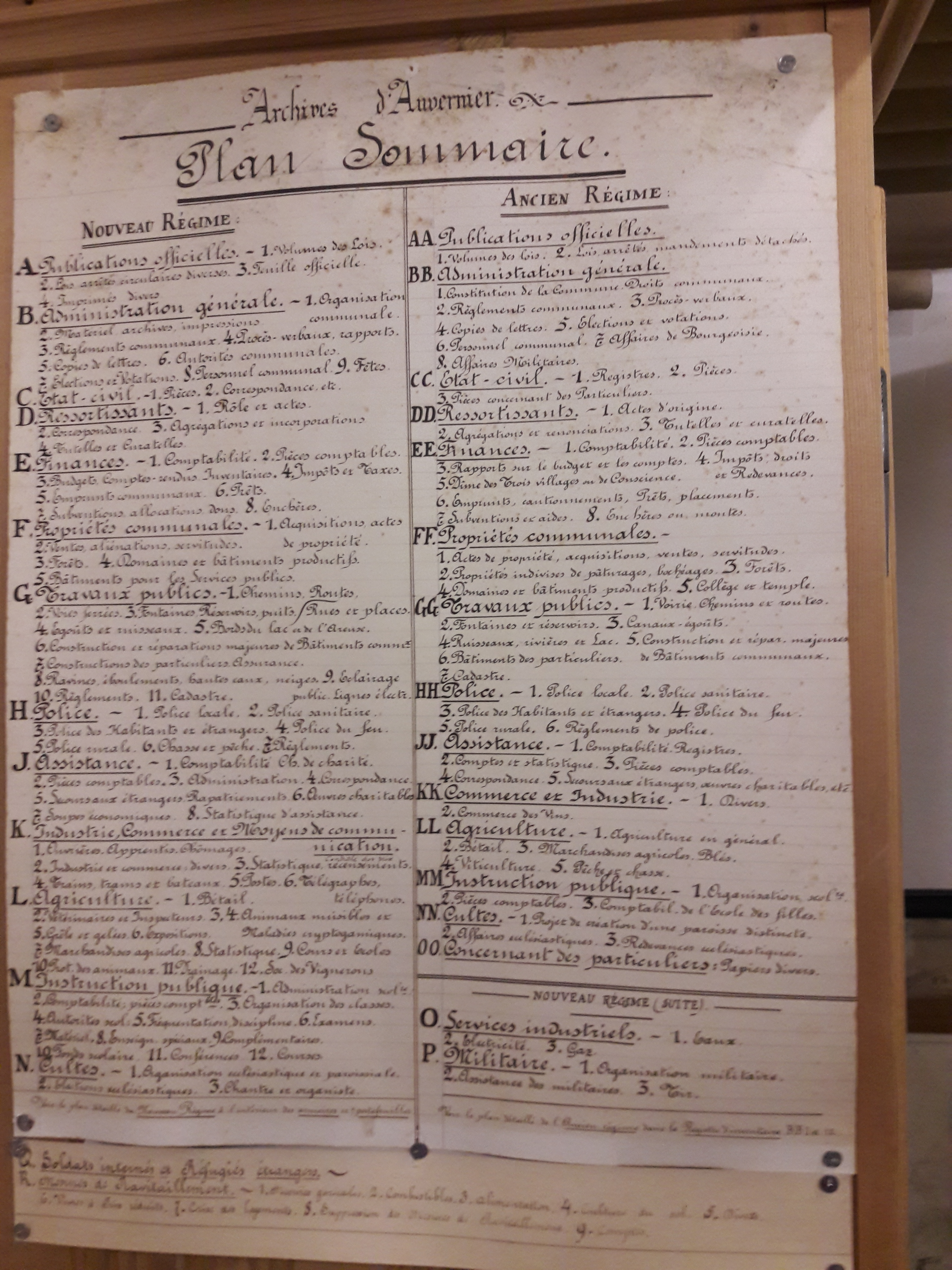 Feuille grand format affichée sur une armoire en bois décrivant, en écriture manuscrite, un inventaire d'archives du début du 20e siècle (inventaire de type Piaget)